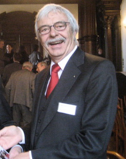 Herbert Kaufmann (rechts) und Walter Rüßmann (links) bei einem Symposium der Universitäts-Augenklinik Gießen